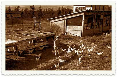 לול התרנגולות משק פועלות ניר העמק